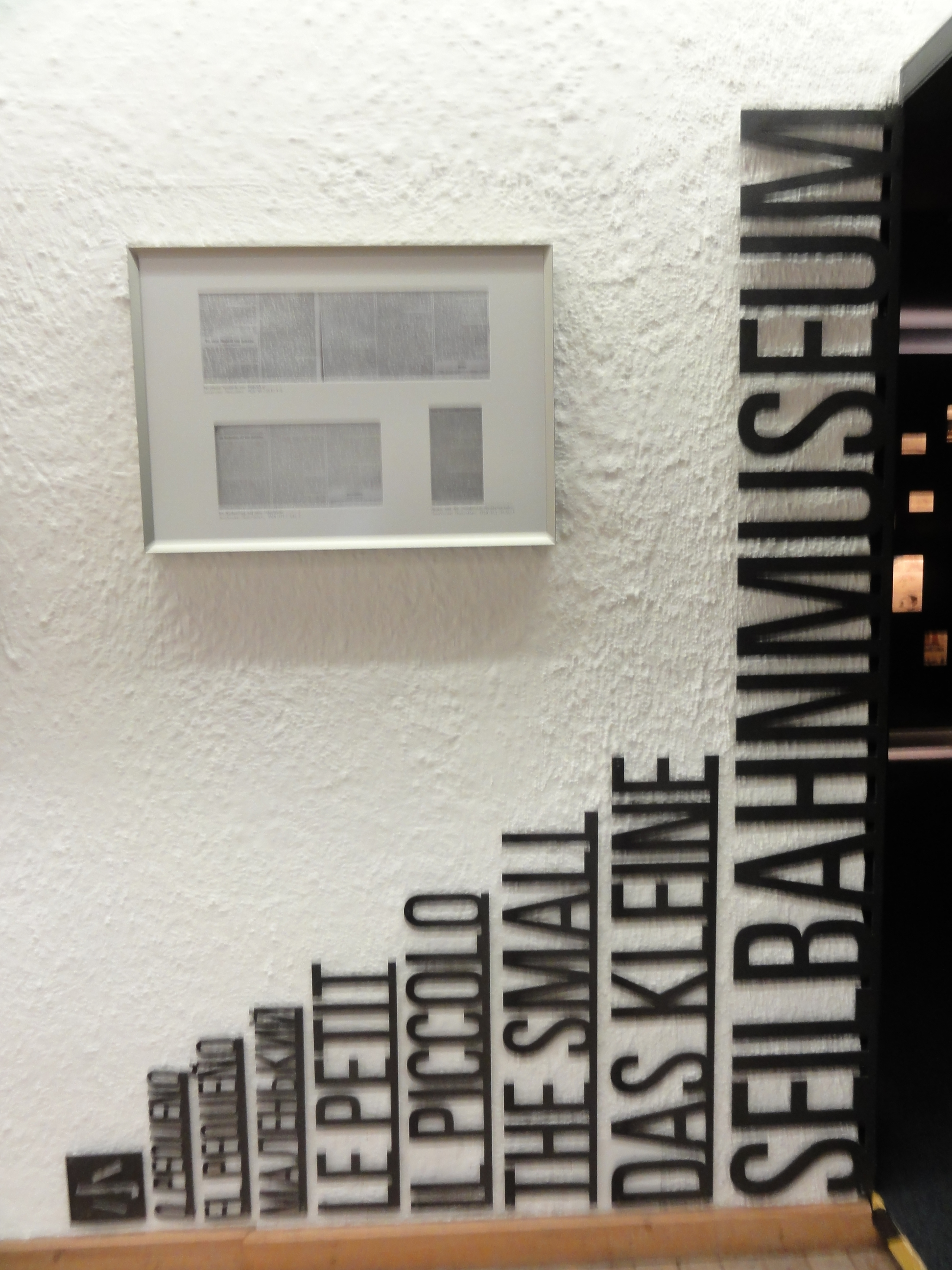 Austria, Nordkettenbahn Talstation